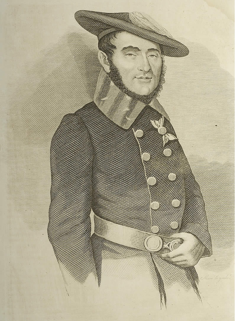 Retrato en grabado de Xavier Auguet de Saint Silvain, barón de los Valles, de P.C. Maré. Recogido en el libro Panorama español, cronica contemporanea. Obra pintoresca [...] destinada a esponer todos los acontecimientos politicos desde octubre de 1832 hasta nuestros dias; con los retratos de los personajes que han figurado durante la revolucion [...] y las principales acciones y escaramuzas de la Guerra Civil..., Imprenta del panorama español, 1842.